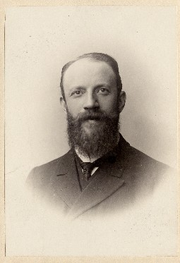 Louis Franck (1868 - 1937) Liberaal politicus die een belangrijke rol speelde in de vernederlandsing van het Vlaamse rechtsleven